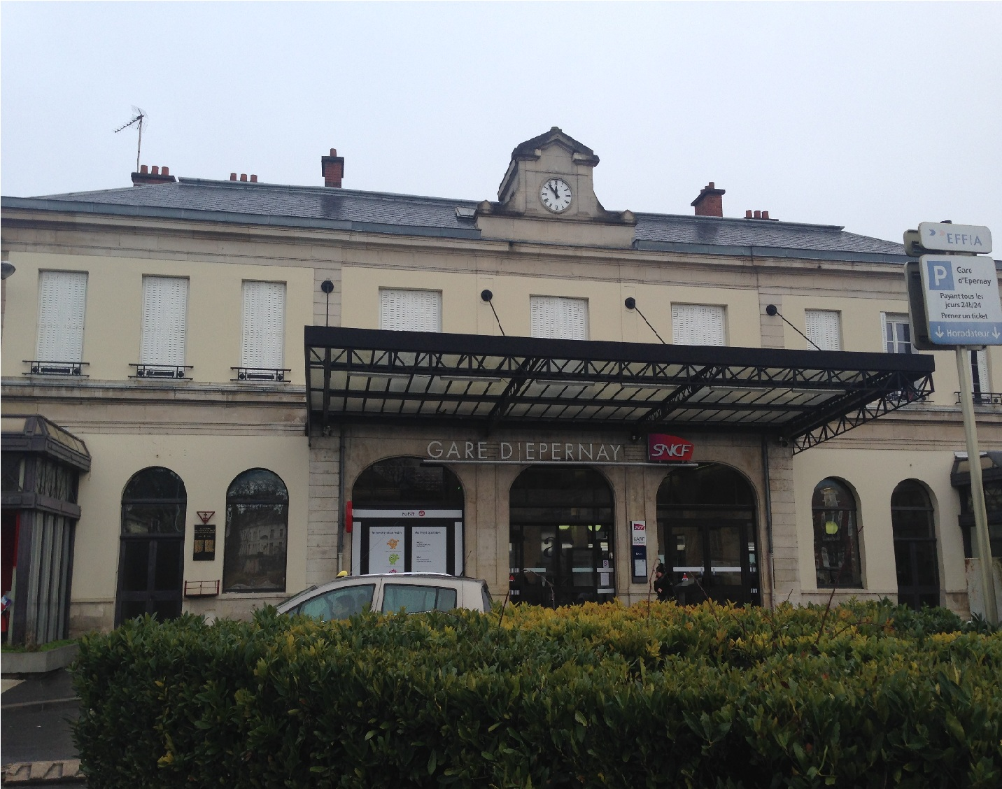 埃佩尔奈站（Gare d'Epernay）